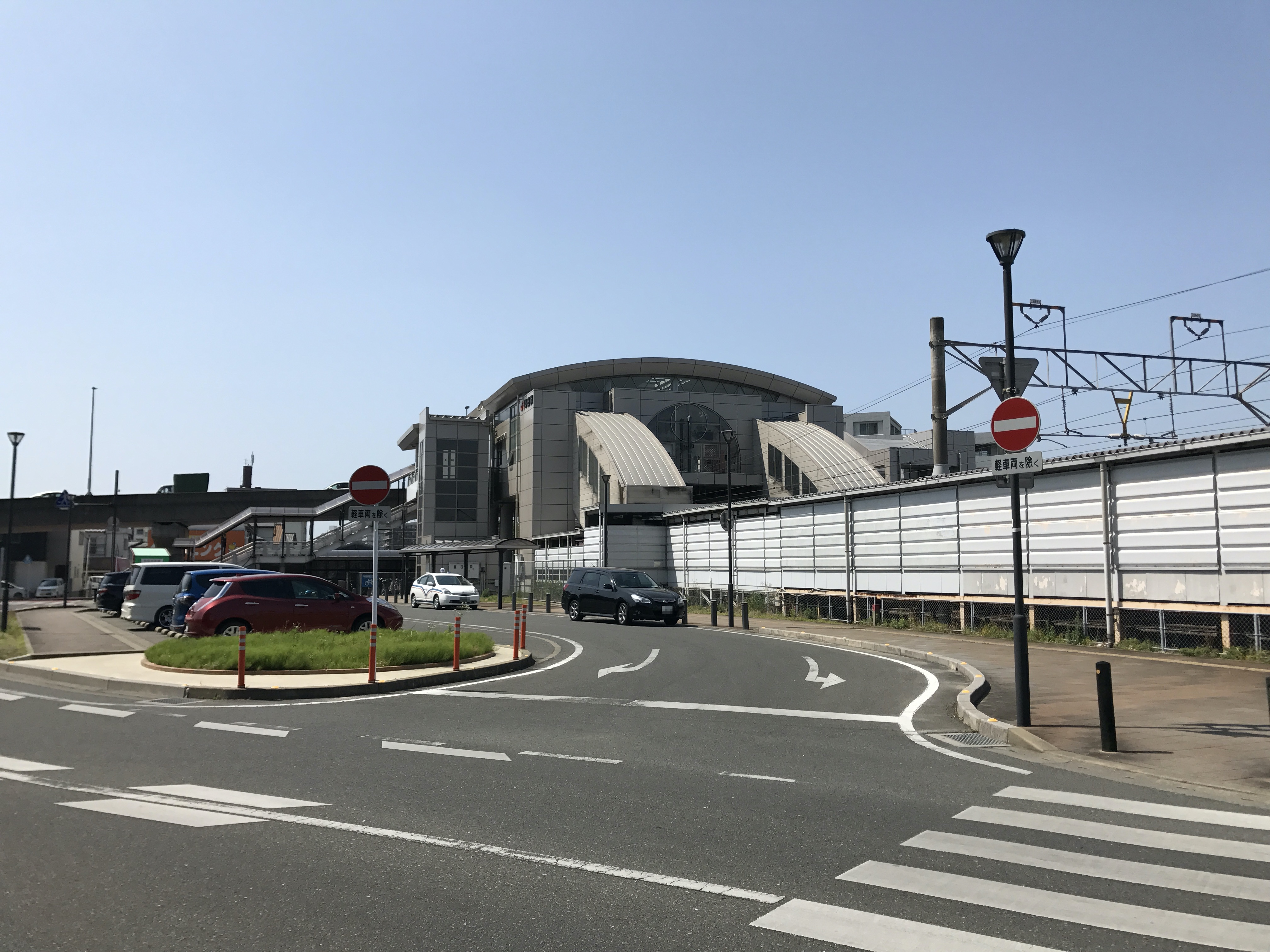 春日駅の遠景